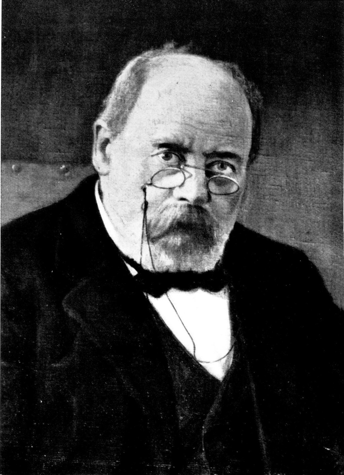 Bild des Industriellen Emil Haldy, des Vizepräsidenten der Handelskammer des Saarlandes. Das Bild ist abgedruckt in: Fritz Hellwig: Die Saarwirtschaft und ihre Organisationen : seit der Errichtung der Industrie- und Handelskammer zu Saarbrücken 1863/64 ; im Auftrag der Kammer anläßlich ihres 75jährigen Bestehens, 1939